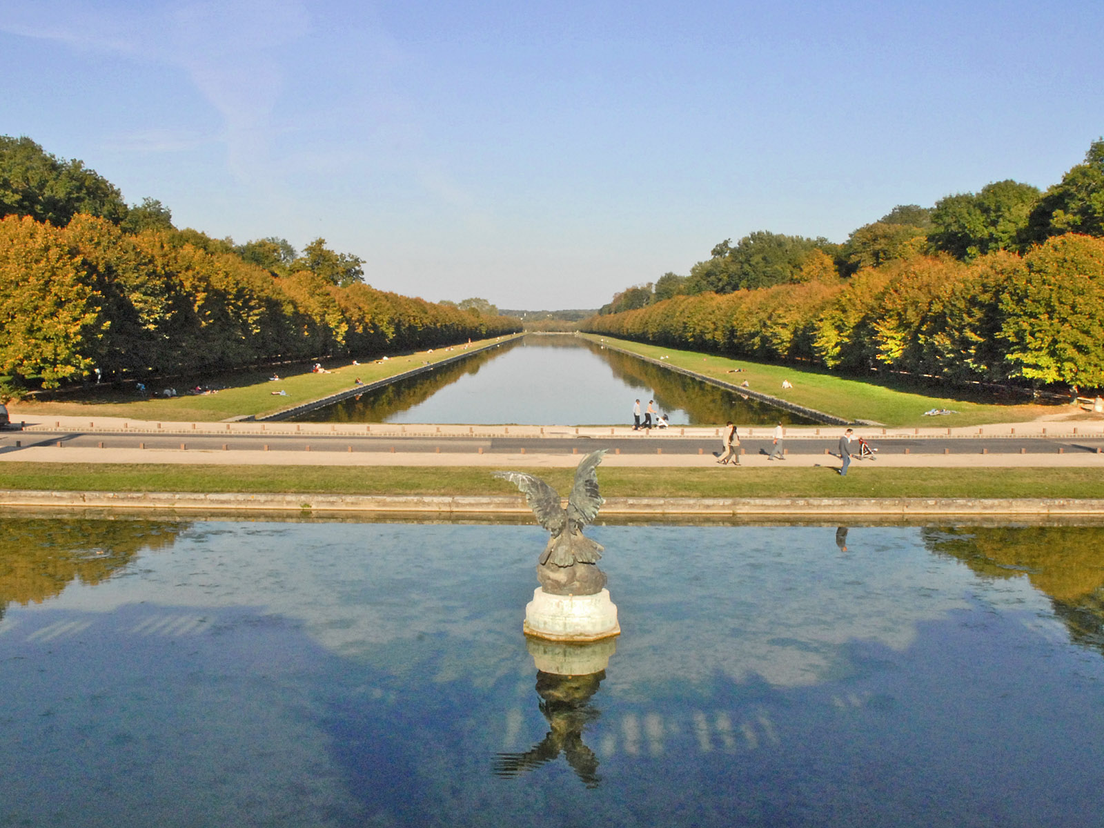 En contrebas du parc, à l'est, on domine le bassin des Cascades, orné en son milieu depuis 1866 d'un Aigle défendant sa proie en bronze, et l'on aperçoit le parc de plus de 80 hectares, constitué sous Henri IV et traversé par le grand canal de près de 1200 m creusé de 1606 à 1609. Le château de Fontainebleau offre le souvenir de plus de 700 ans de présence des souverains de France, de l’intronisation de Louis VII en 1137 à la chute du Second Empire en 1870.